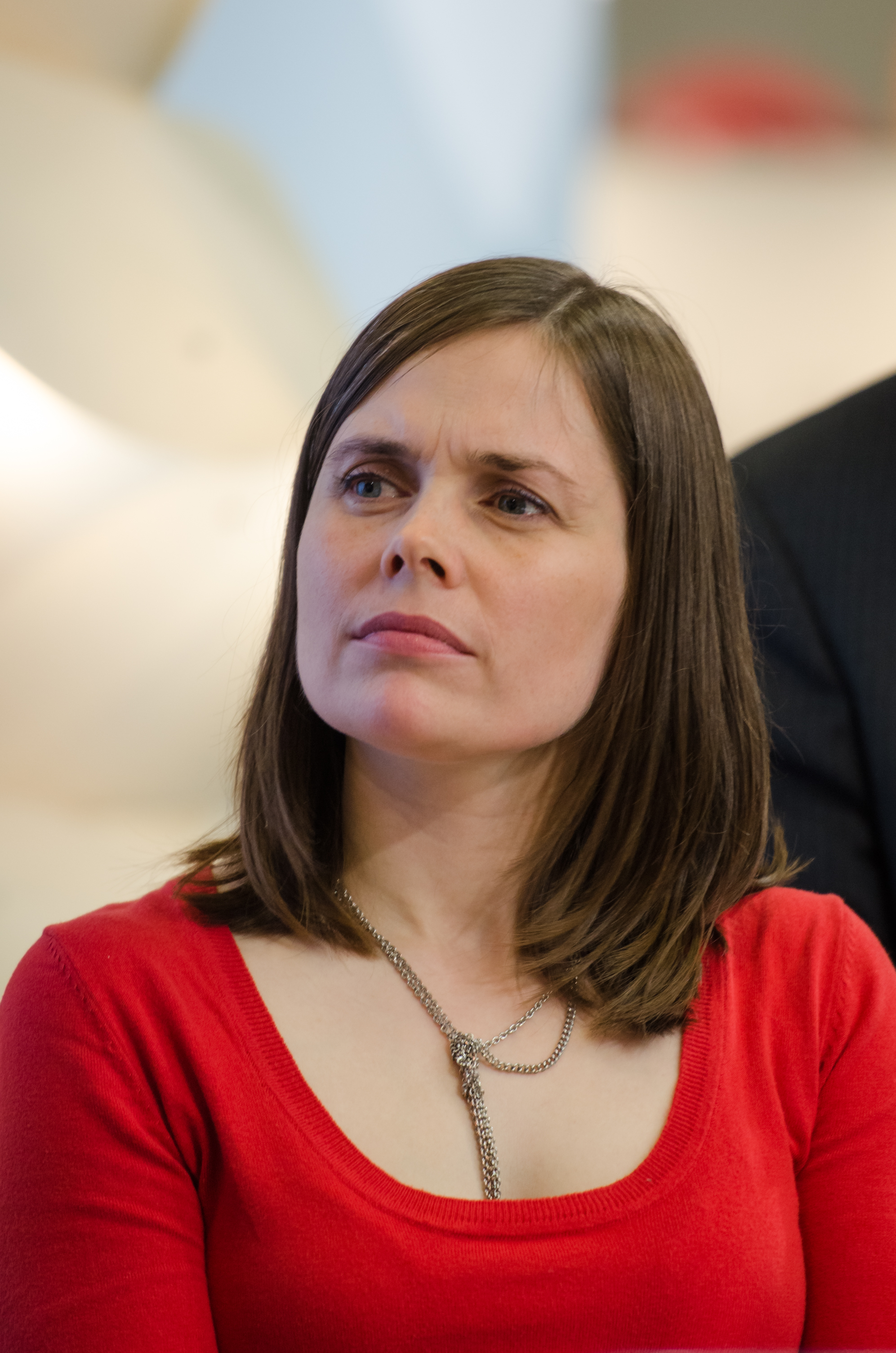 Katrín Jakobsdóttir at Göteborg Book Fair 2012 03